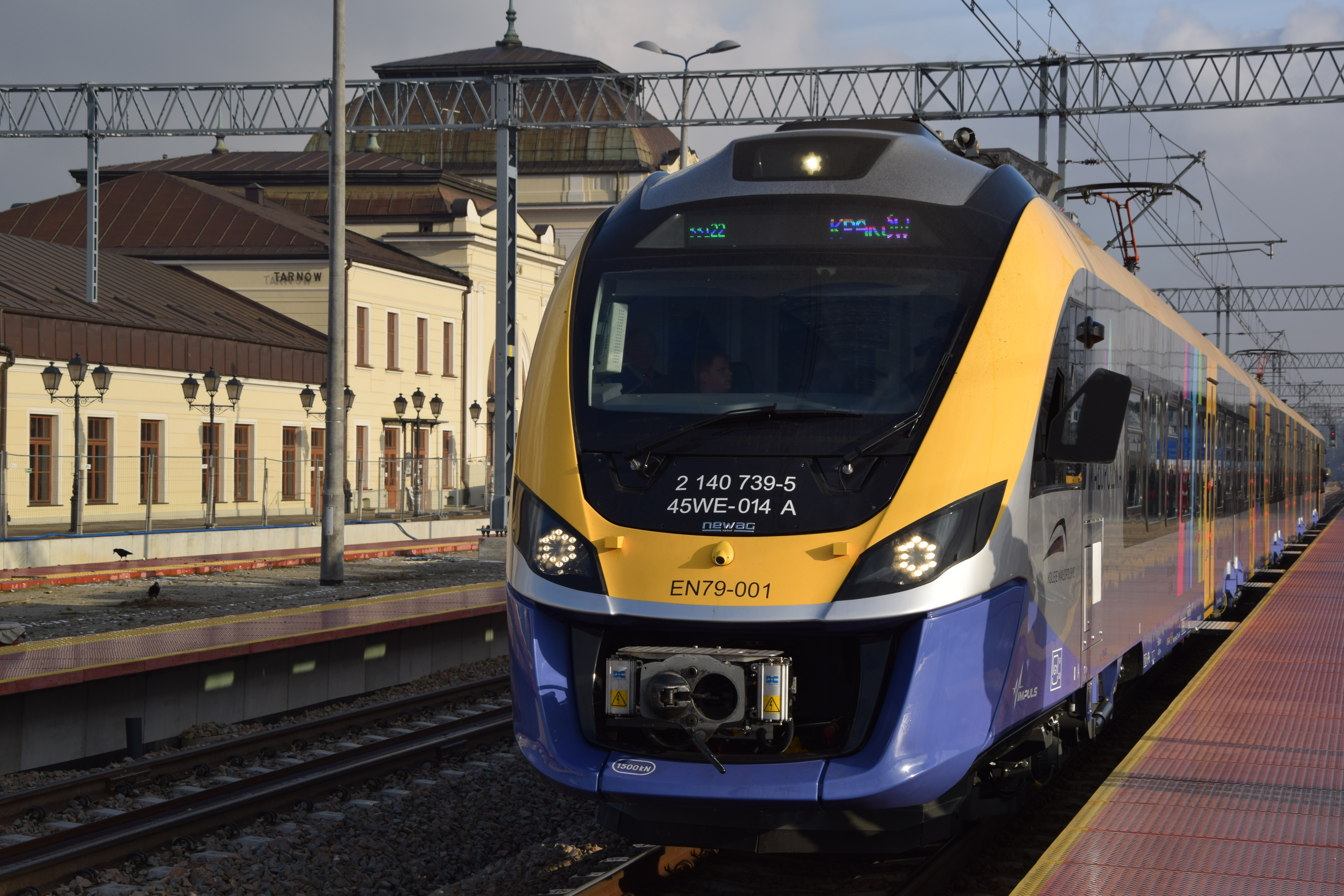 Newag Impuls 45WE-014 Kolei Małopolskich na inauguracji SKA3 w Tarnowie.